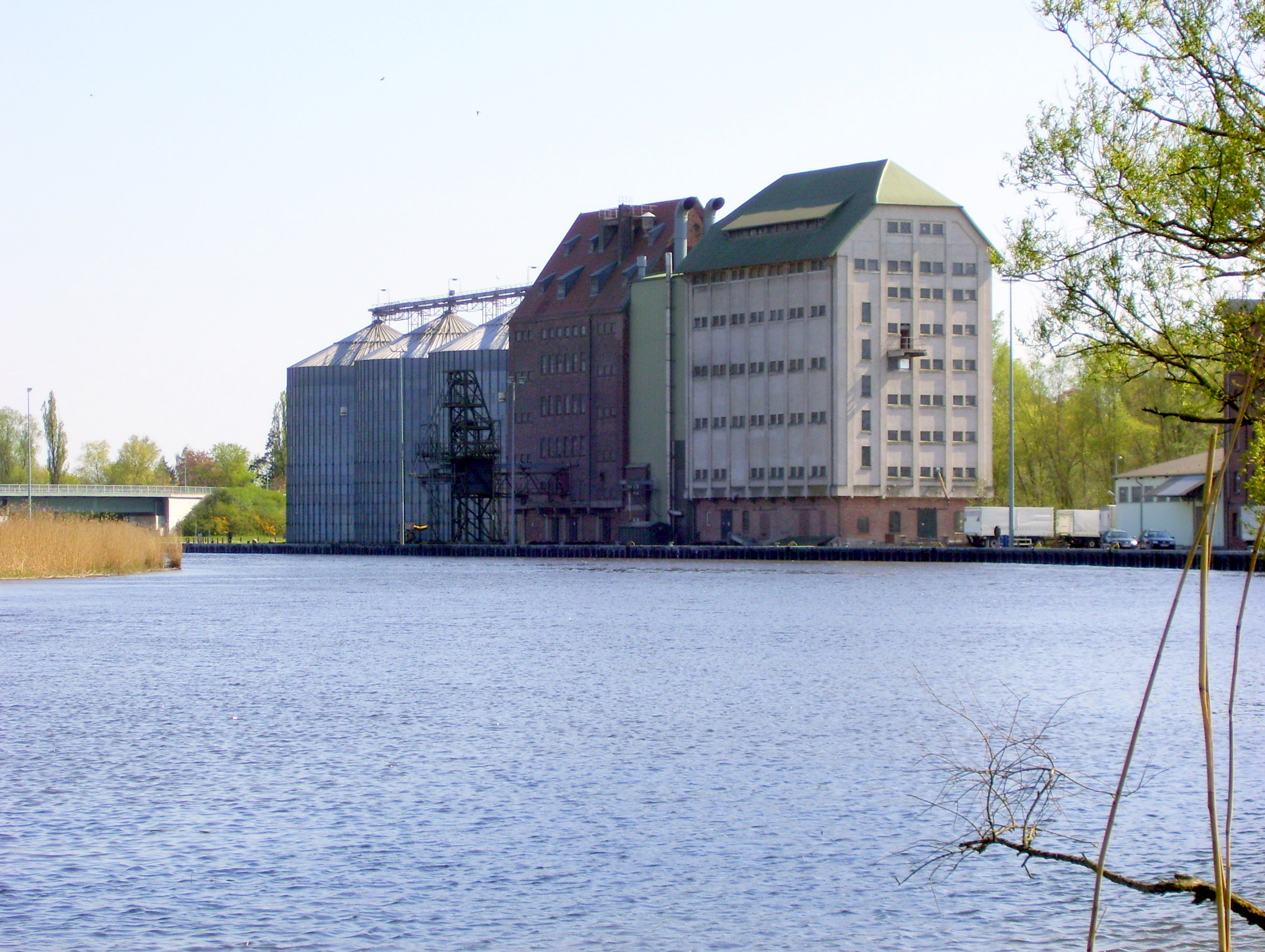 Peene bei Jarmen, Kornspeicher am Hafen